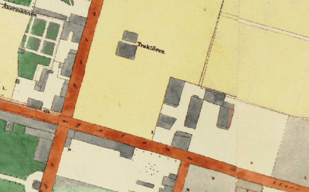 Mäster Anders, restaurang från 1692, i kvarteret Traktören på Stockholmskartan från 1863